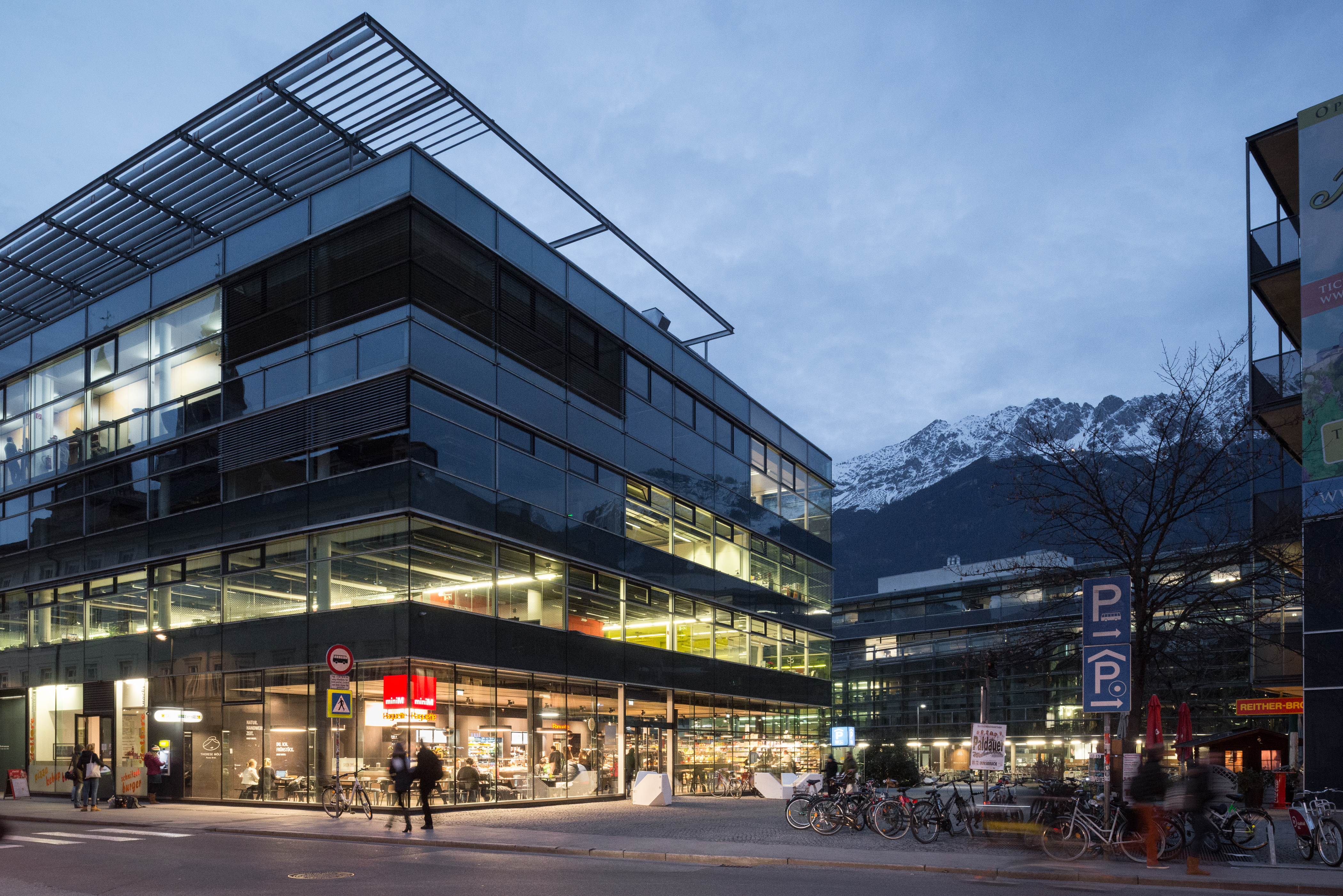 Der miniM Markt befindet sich nahe der Wirtschaftsuniversität in Innsbruck und wurde von LAAC Architekten entworfen.